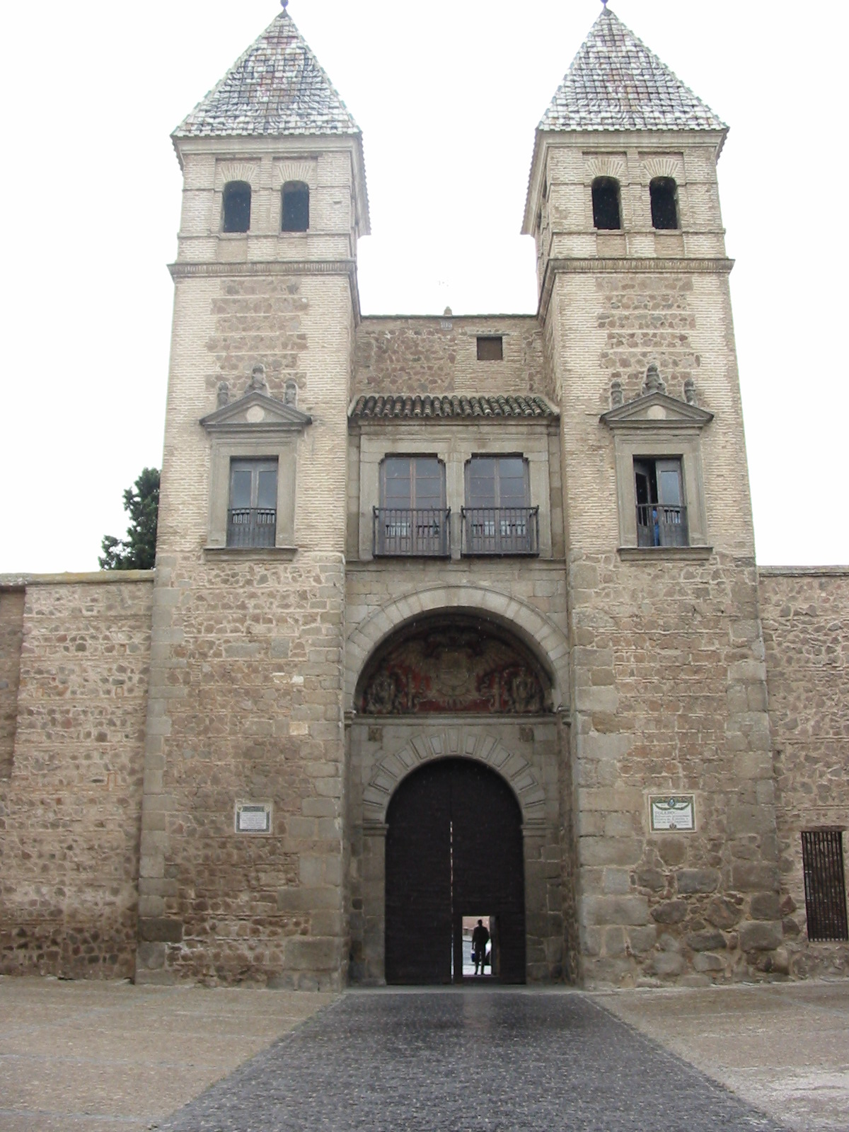 Buerta de Bisagra en Toledo, España. Mandada construir por Carlos V. Door of Bisagra. Toledo, Spain. Built by the Emperor Charles V.